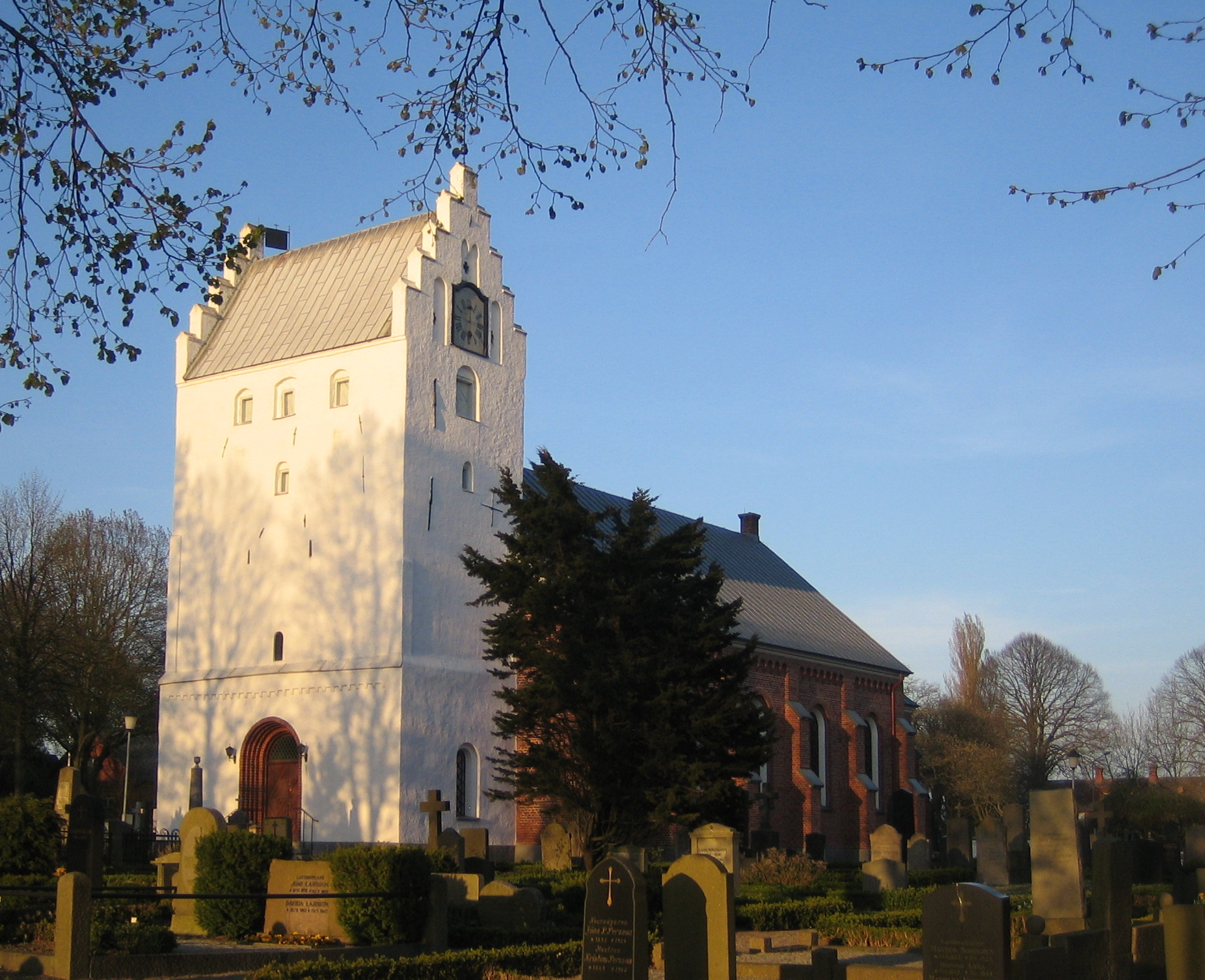 Västra Klagstorps kyrka, Malmö